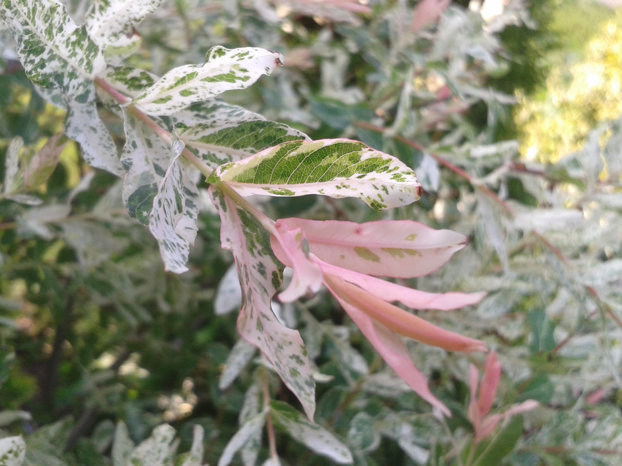 Kwiatek